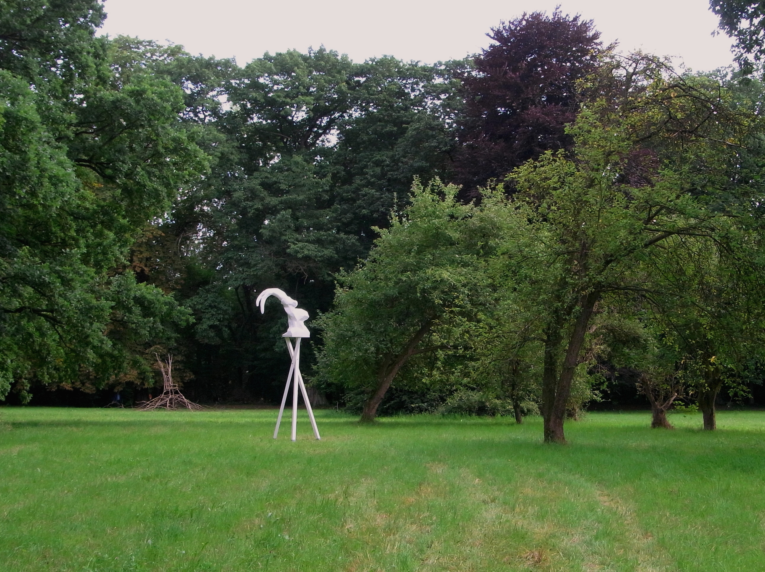 In der Freiluft-Kunstausstellung Verformungen vom 13. Juli bis 15. August 2017 in der historischen Gartenanlage des Edelhofs Ricklingen (Am Edelhofe) in Hannover ist die von einer Jury um die hannoversche Kuratorin Dagmar Brand ausgewählte Arbeit der Künstlerin Sina Heffner unter dem Titel „Hochplateau“ zu sehen ...